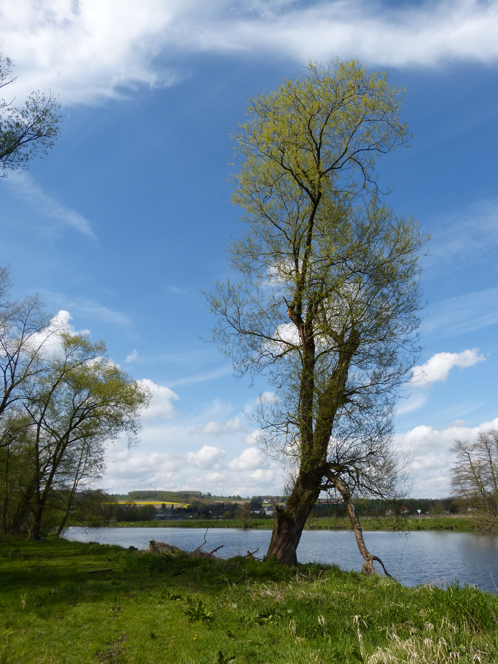 Alter Baumbestand (Salix sp.) an der Ruhr im Naturschutzgebiet „Auf dem Stein“ in Menden (Vordergrund); die gegenüberliegende Ruhrseite gehört zu Fröndenberg (dort NSG „Kiebitzwiese“)